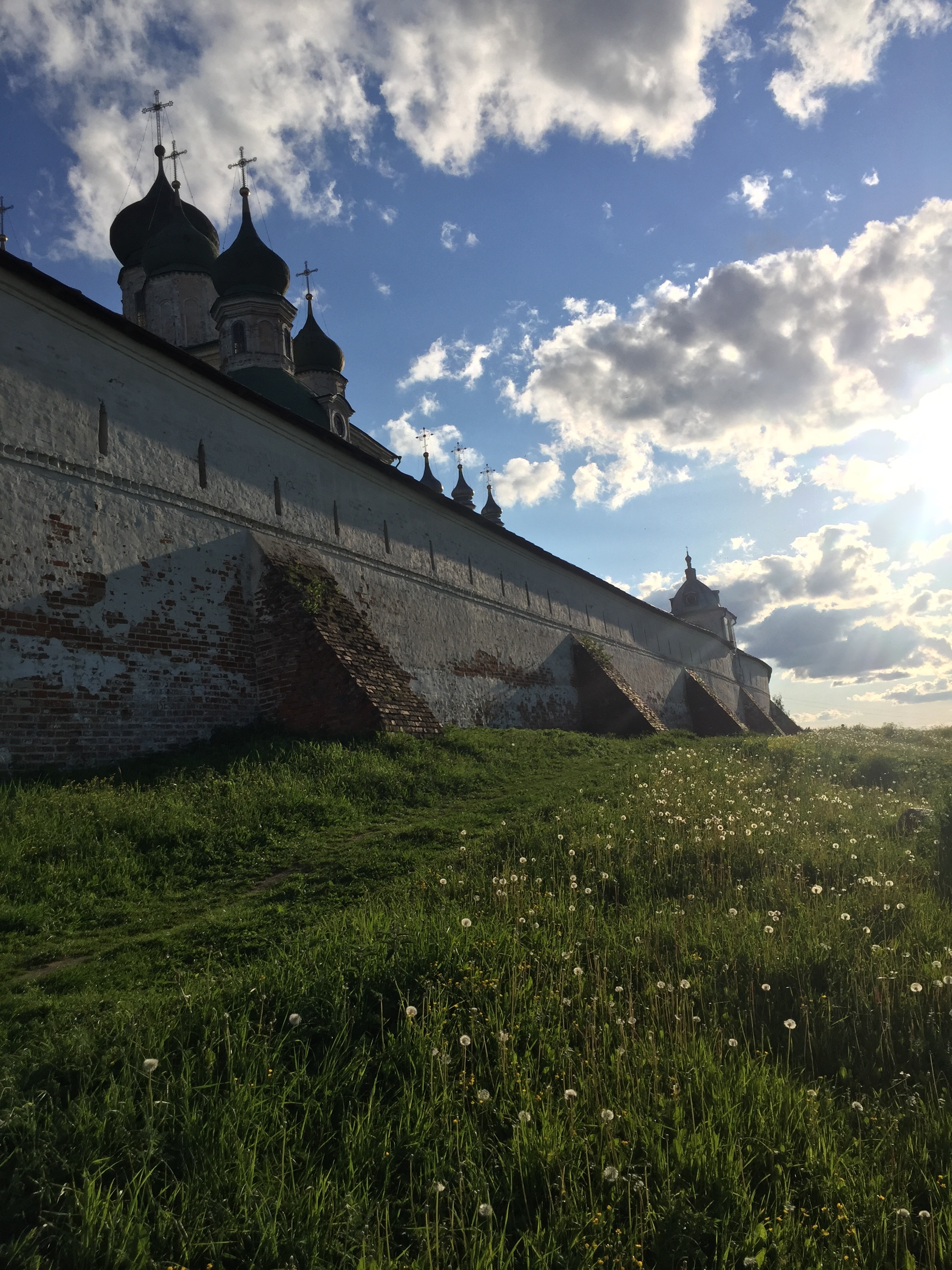 Стены Горицкого монастыря (2019)